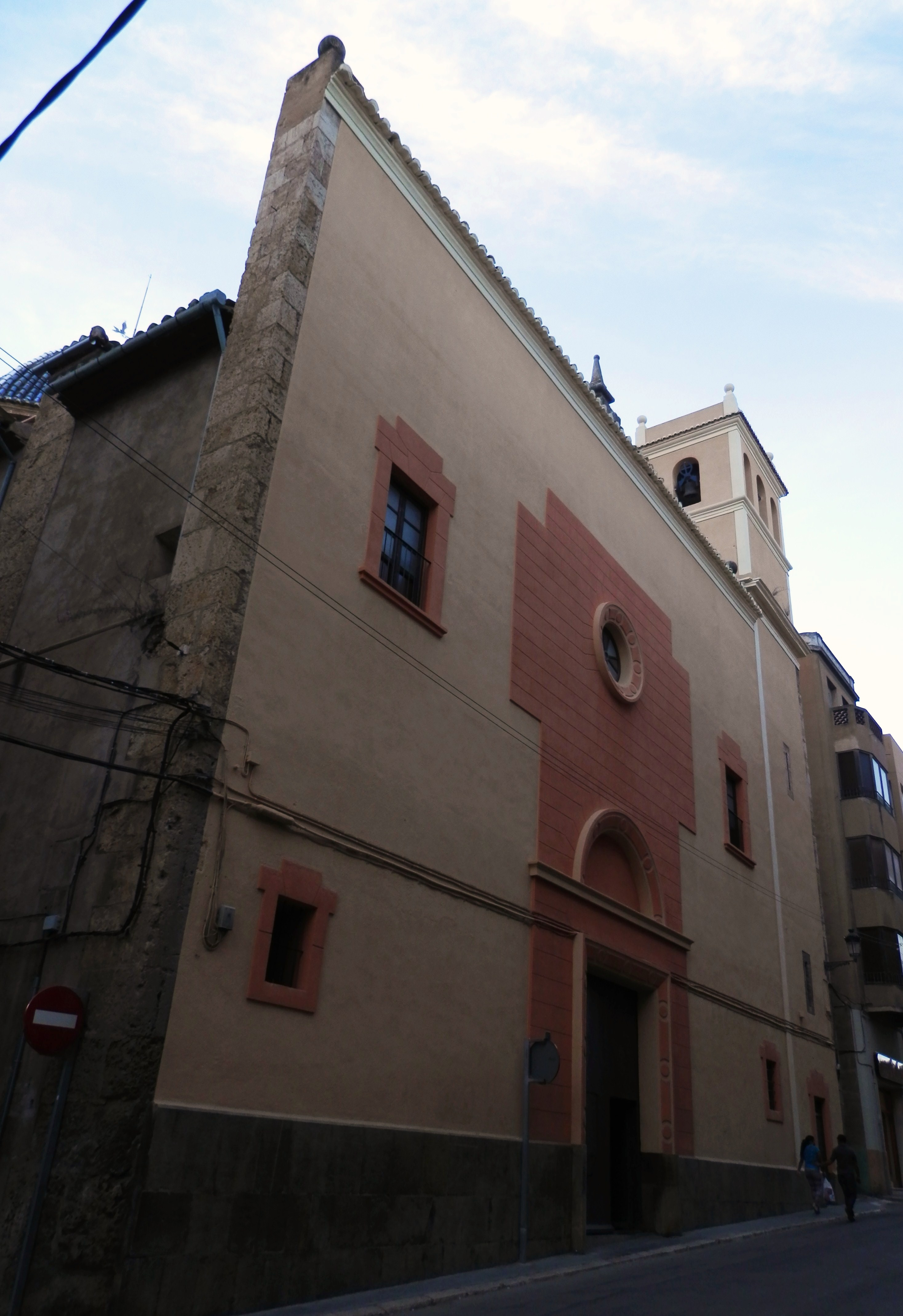 Església dels dominics o de santa Maria, Sogorb.